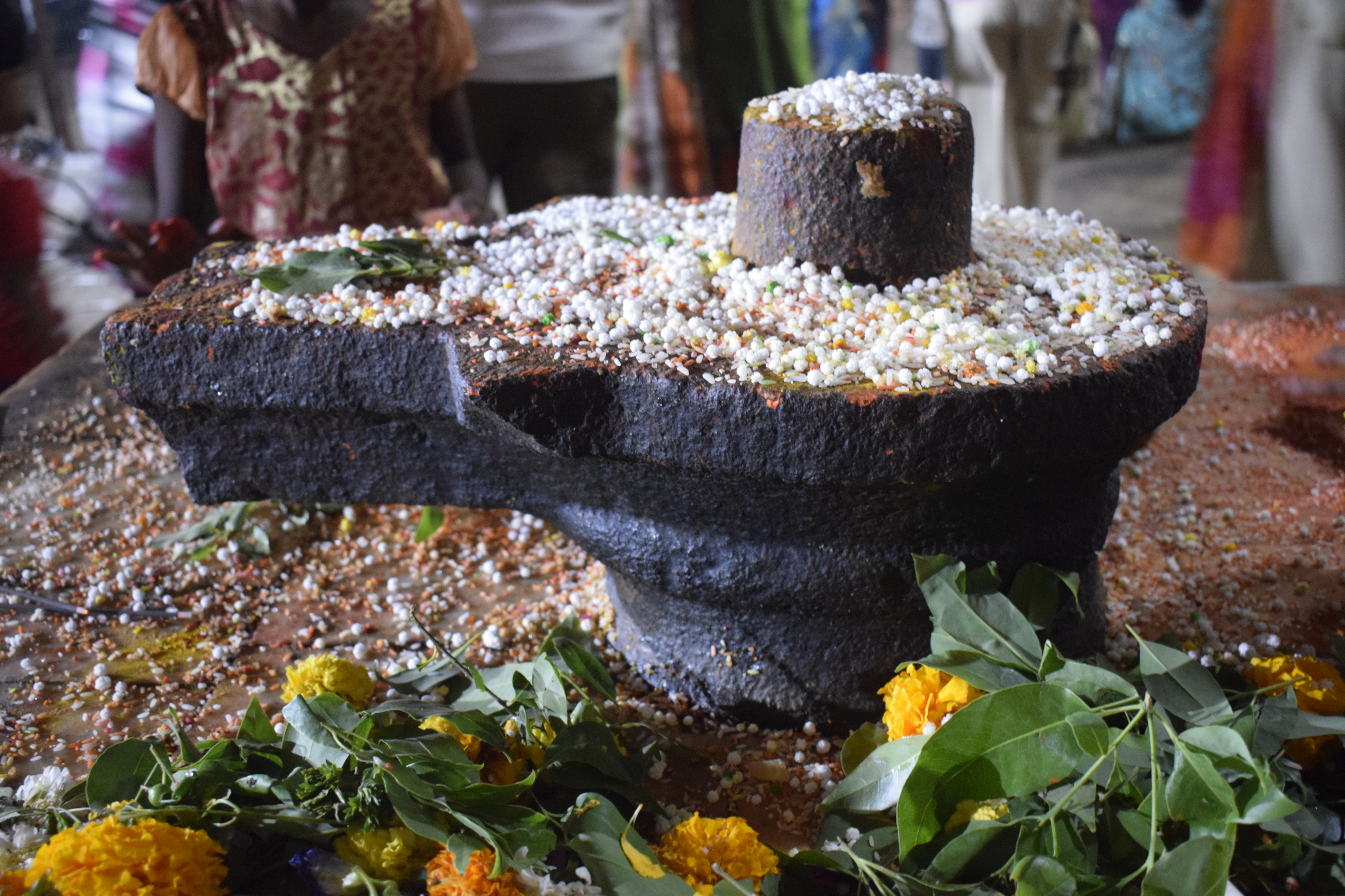 श्री उमेश्वर लिंग